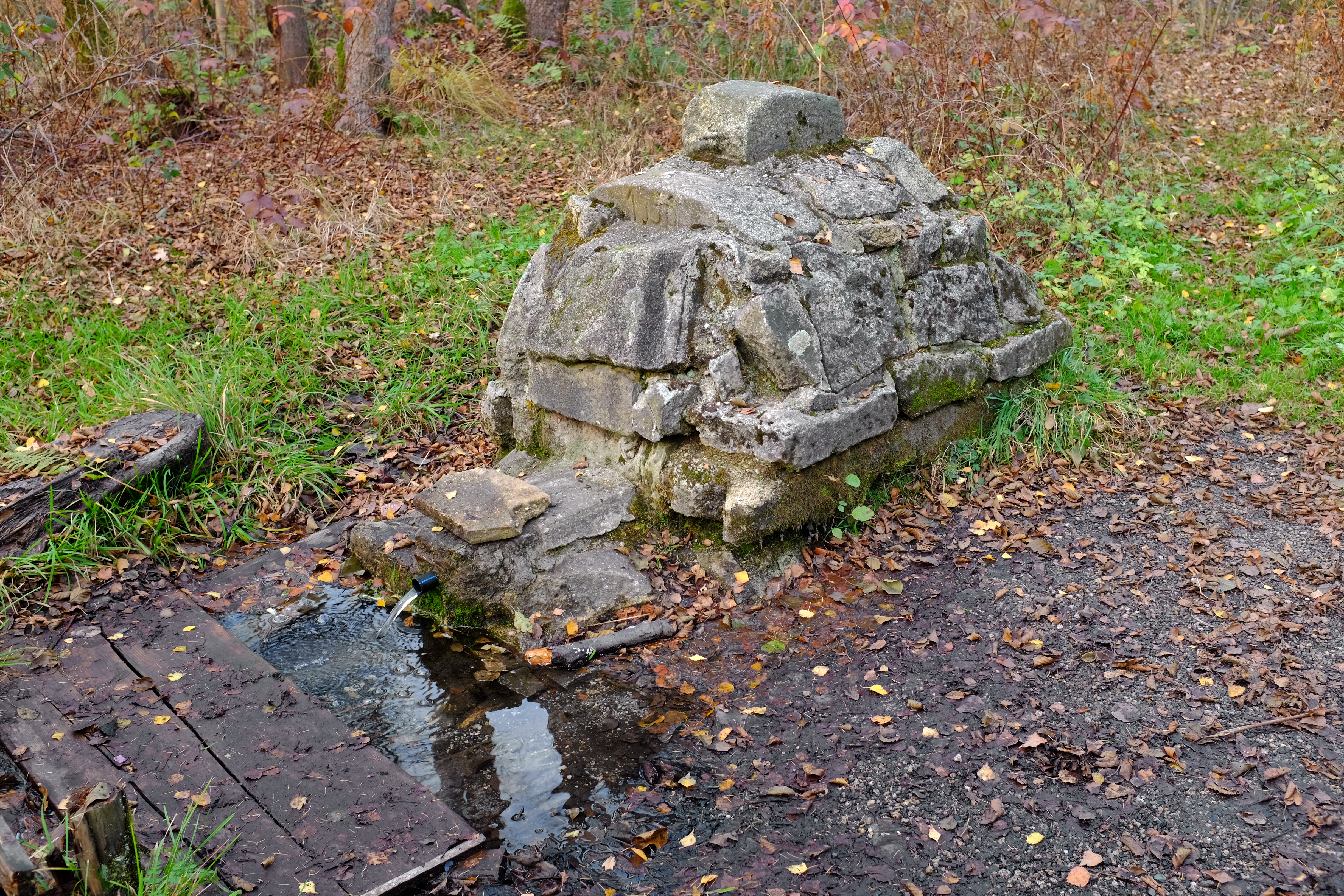 Pochlovická minerálka, Dolní Pochlovice, okres Sokolov